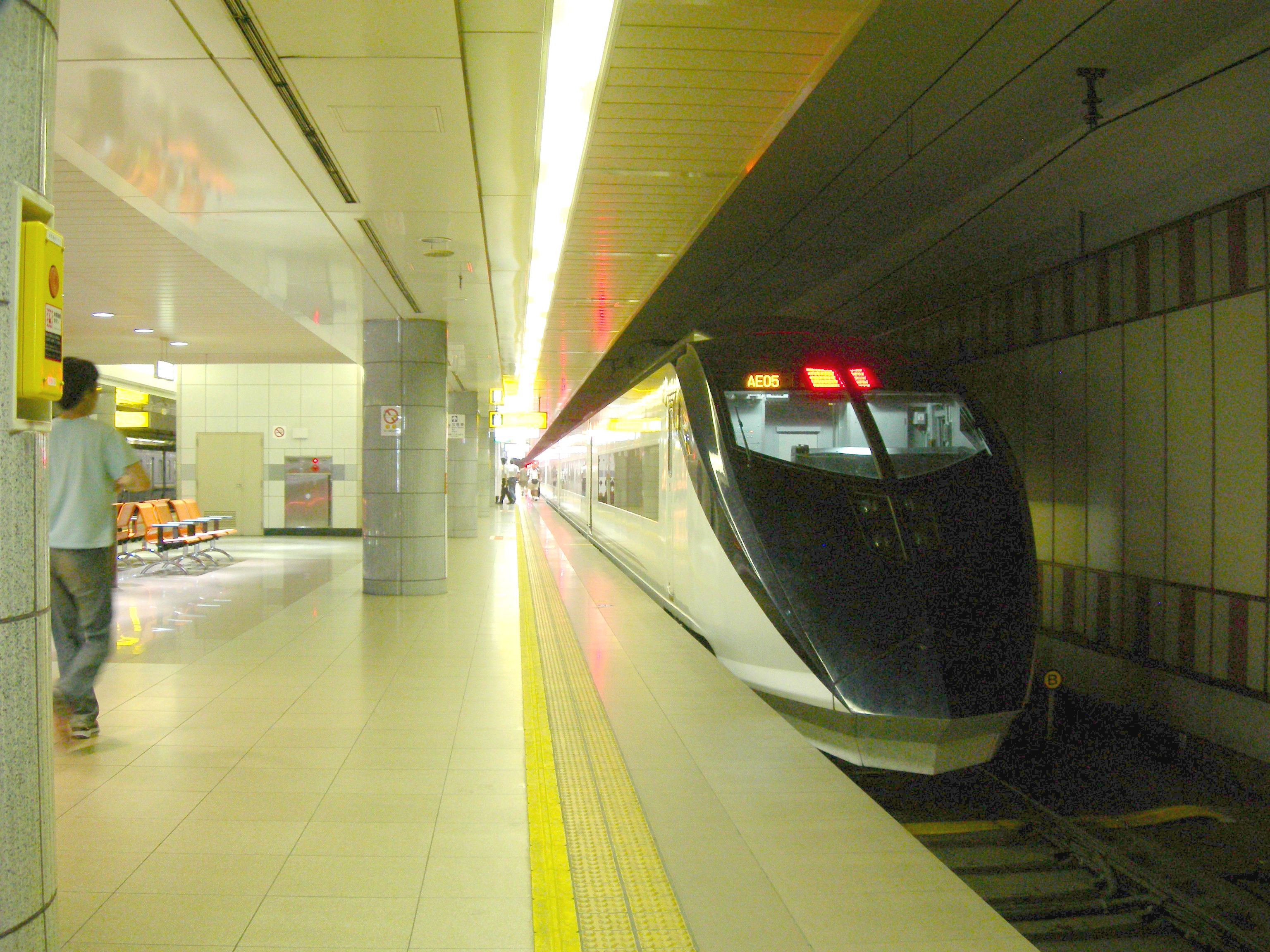 京成電鉄 成田空港駅4番ホーム(成田スカイアクセス線・スカイライナー用ホーム)